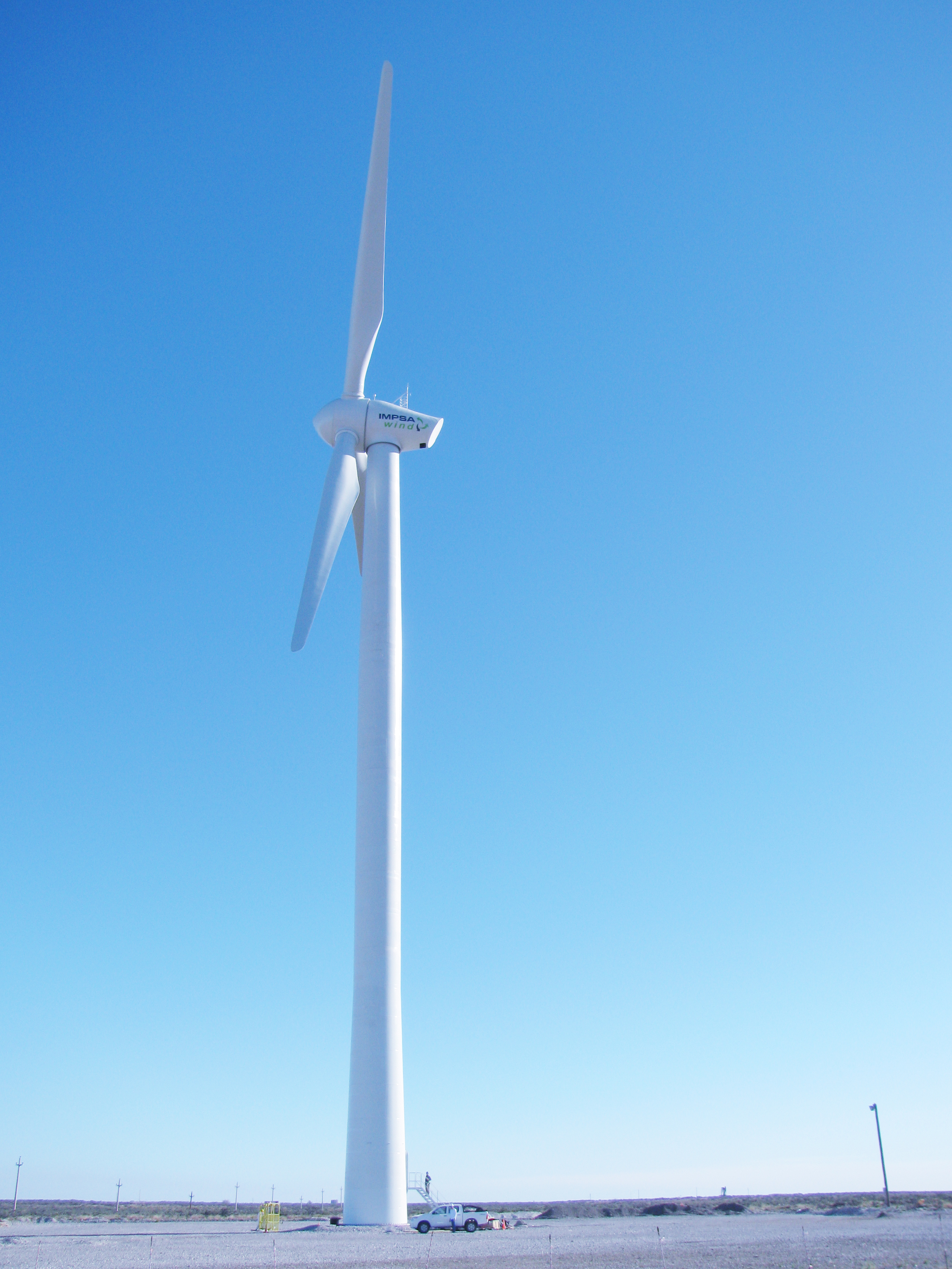 IMPSA Wind – Comodoro Rivadavia.